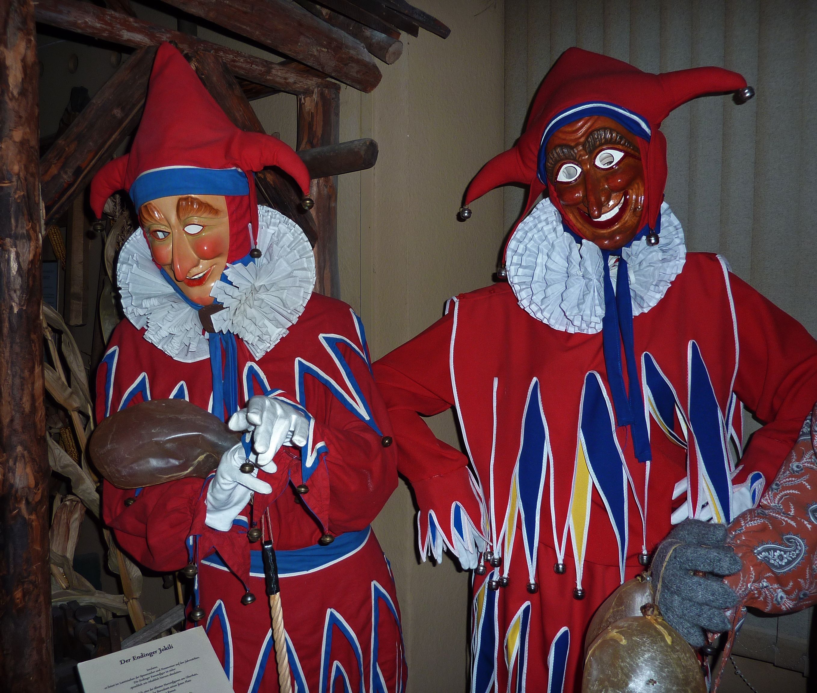 Links ein Jokili aus Endingen, rechts ein Jokili aus der Colonia Tovar in Venezuela